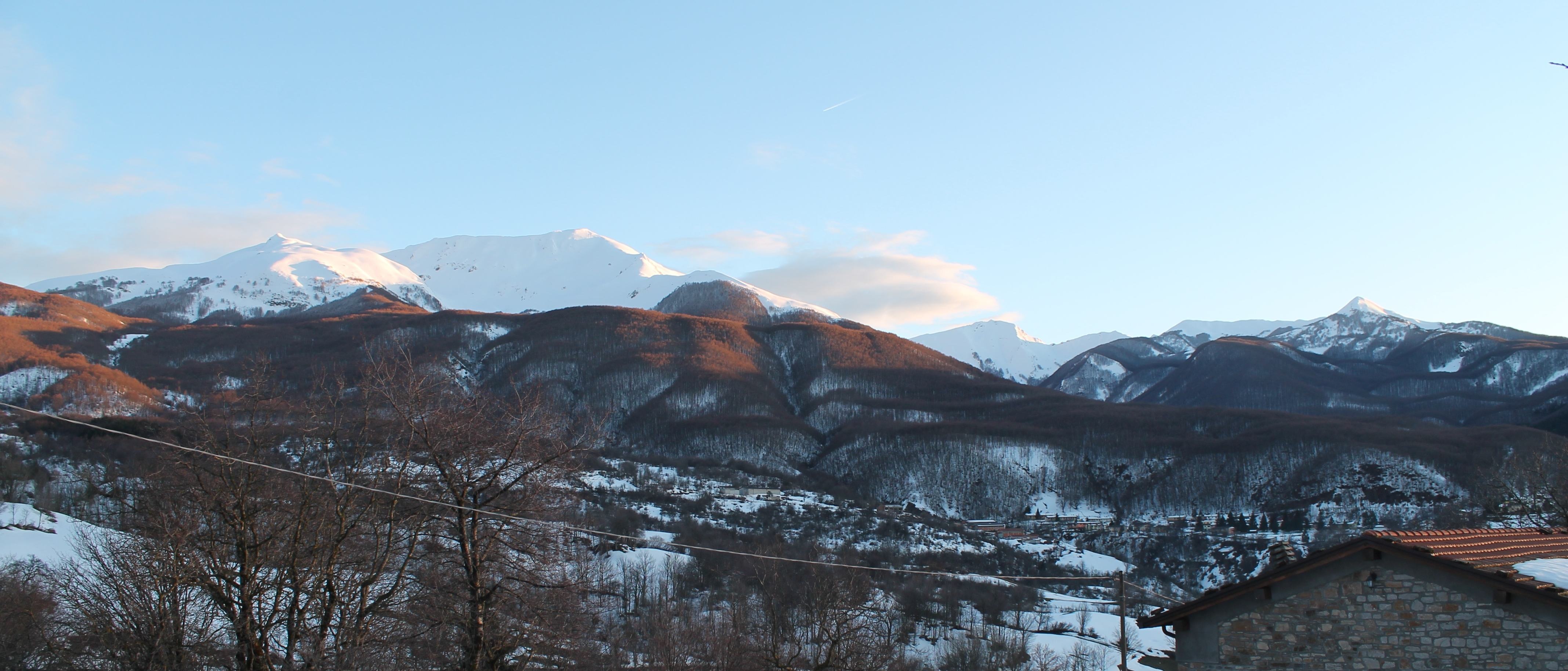 M.te Casarola, Alpe di Succiso, Groppi di Camporaghena e M.te Acuto visti da Succiso Superiore, Ramiseto